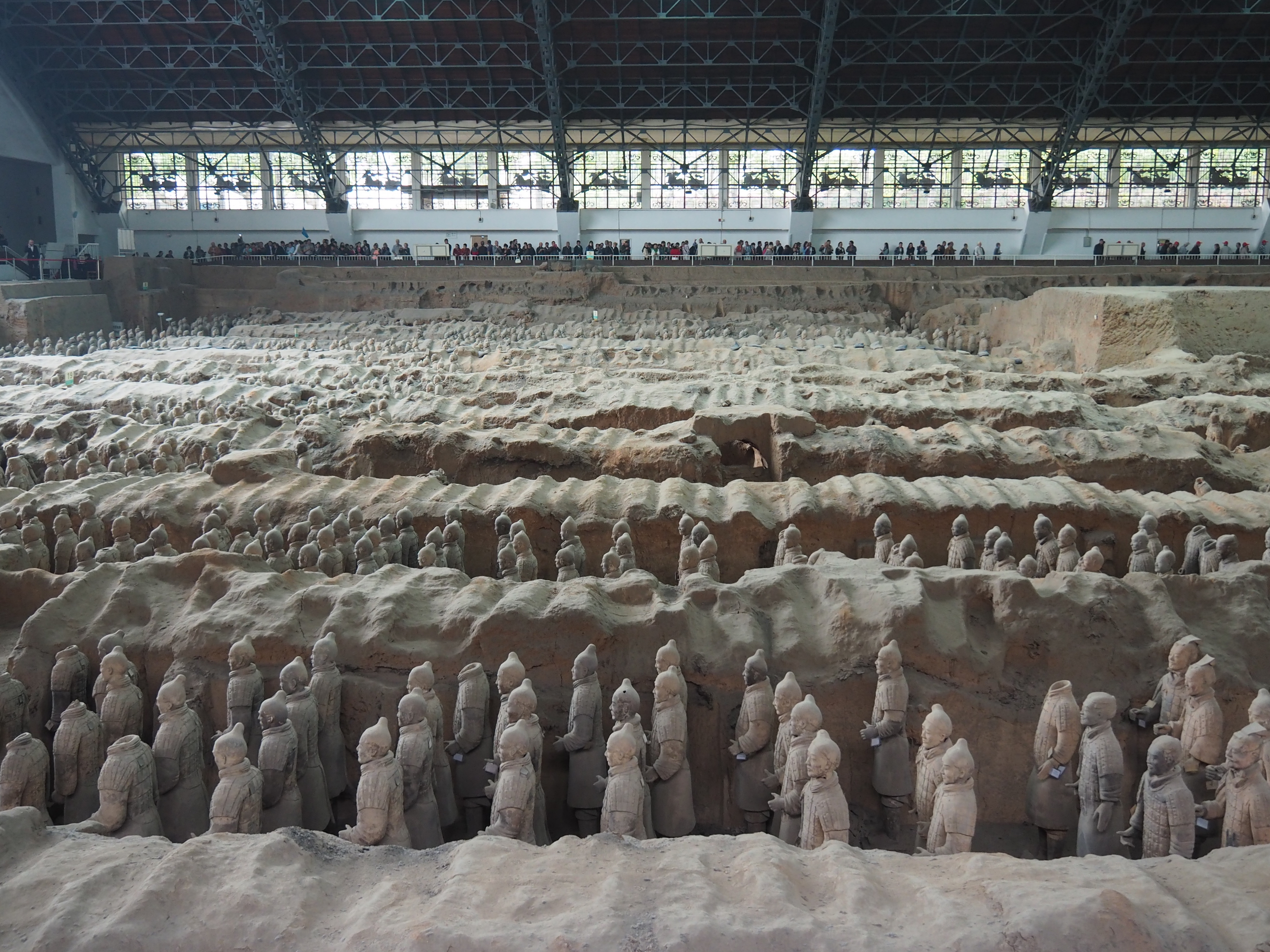 Terracotta Warriors